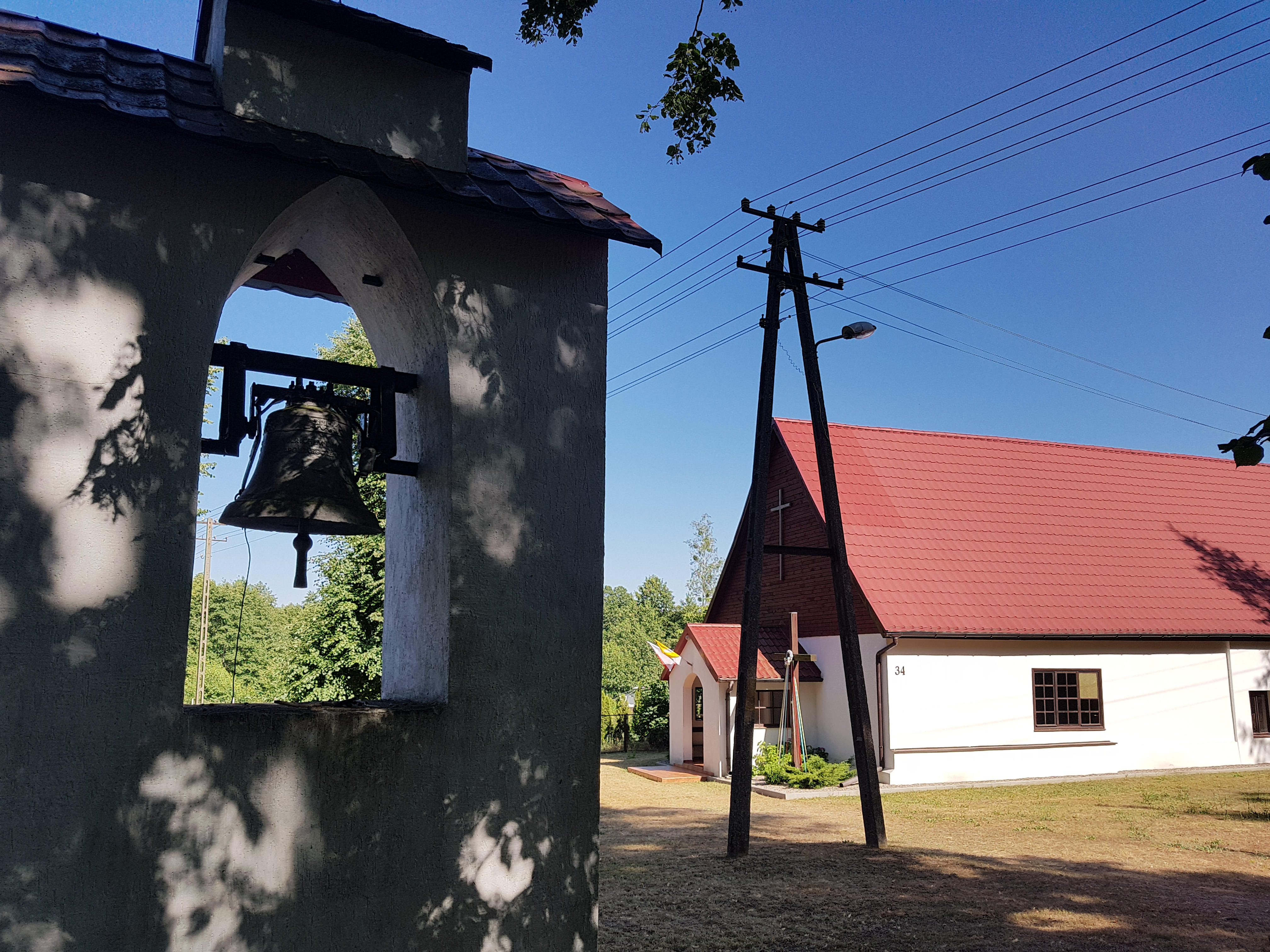 Kaplica pw. Matki Boskiej Częstochowskiej oraz dzwonnica, należąca do rzymskokatolickiej parafii pw. Św. Wojciecha Bp Męczennika w Trzcielu